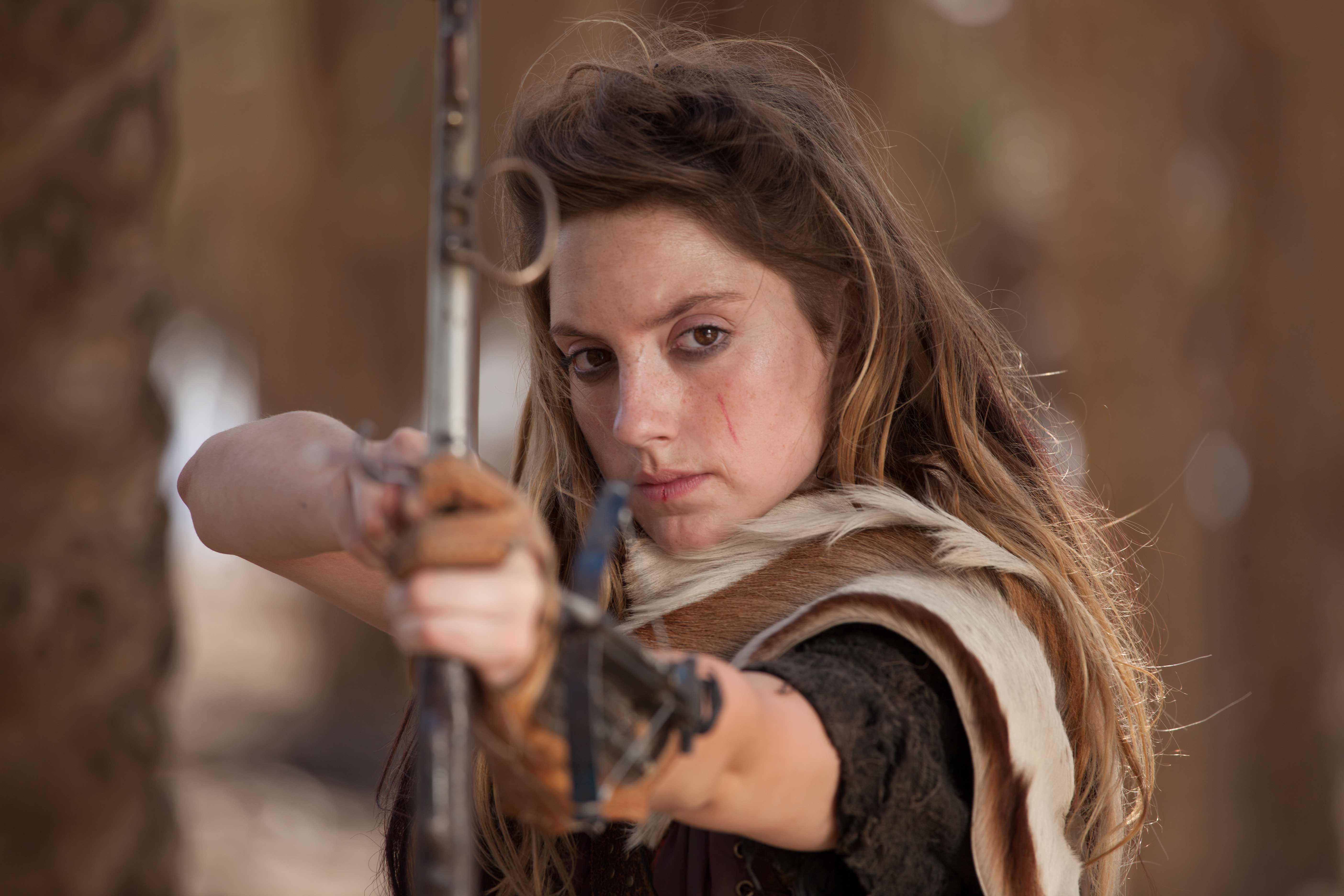 אליאנה תדהר בסרט "גאליס - המסע לאסטרה"